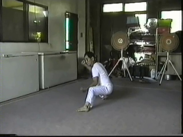 Kusanku